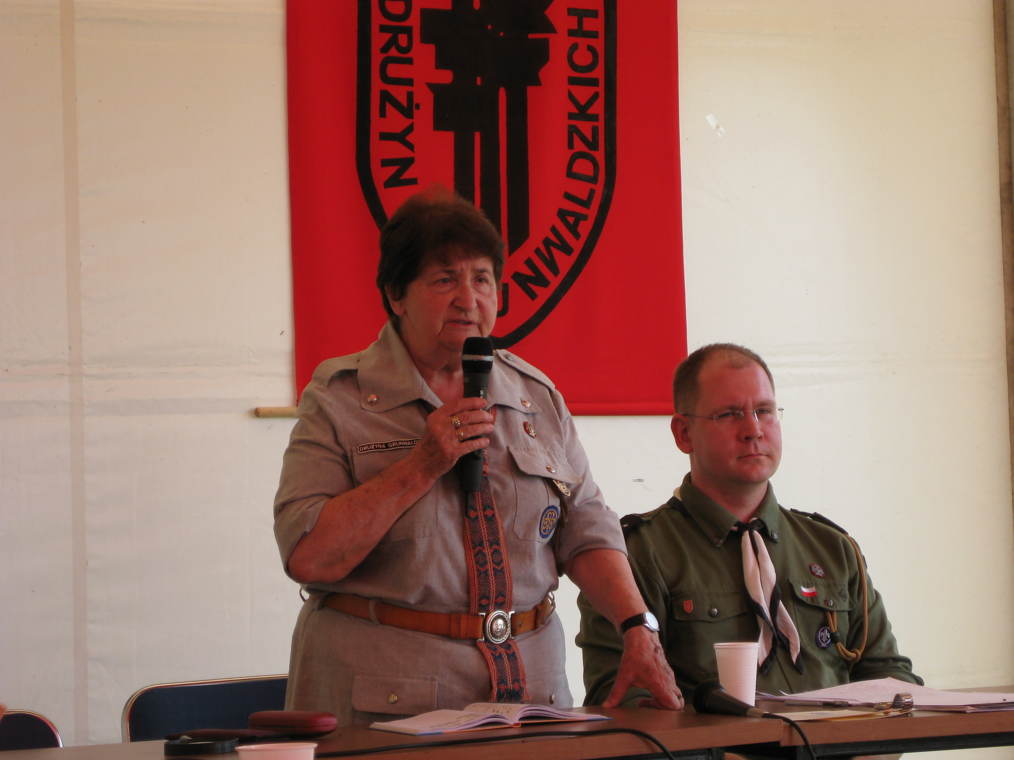 "Wspólnota Drużyn Grunwaldzkich" - Przewodnicząca hm. Barbara Bogdańska-Pawłowska i wiceprzewodniczący hm. Rafał M. Socha